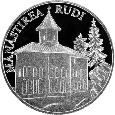 Реверс памятной монеты "Рудьский монастырь"